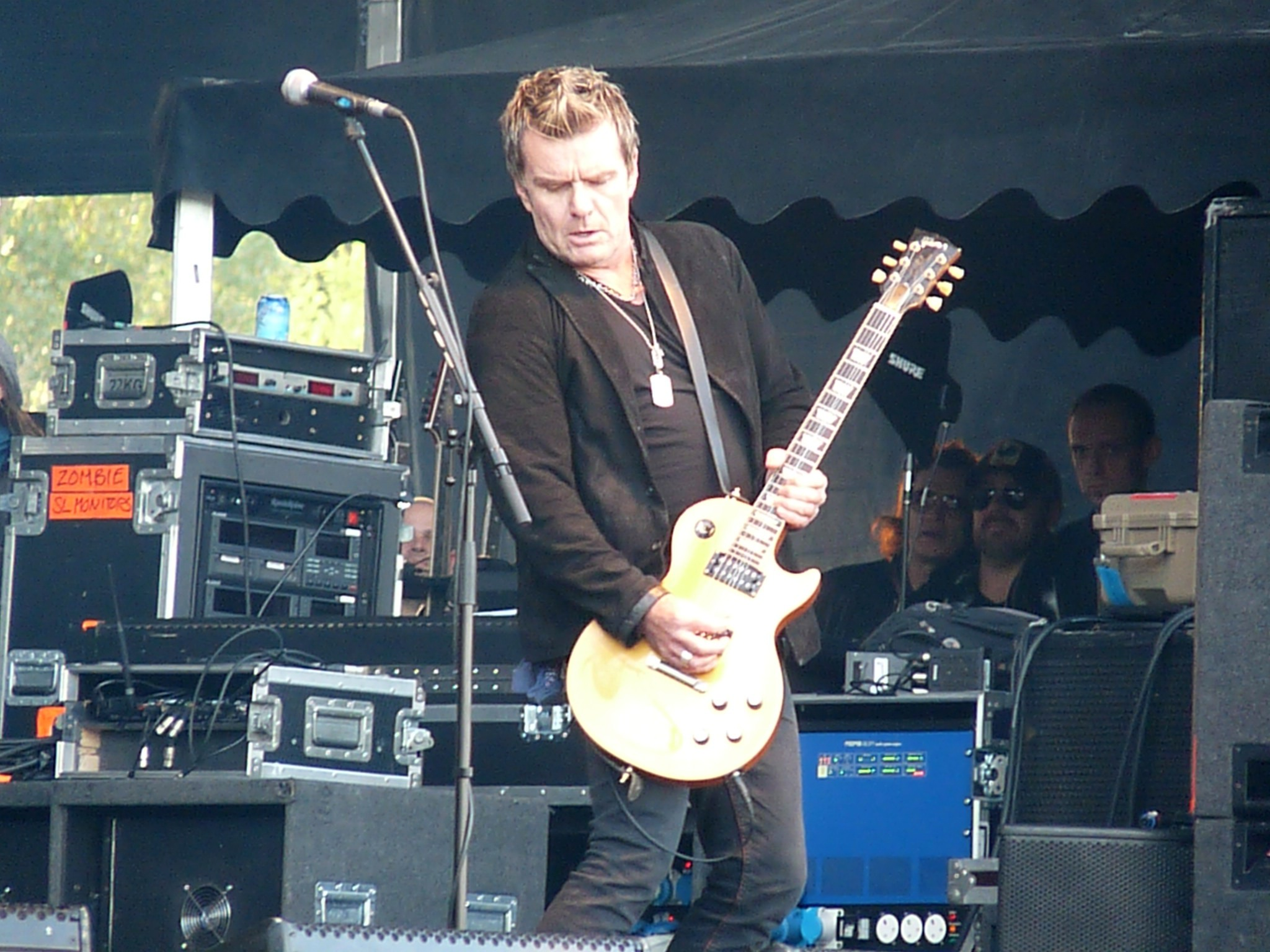 Emiliàn e rumagnòl: Billy Duffy di Cult tòlt śò durànt al Fèstival Rock 'd Azkena dal 2011